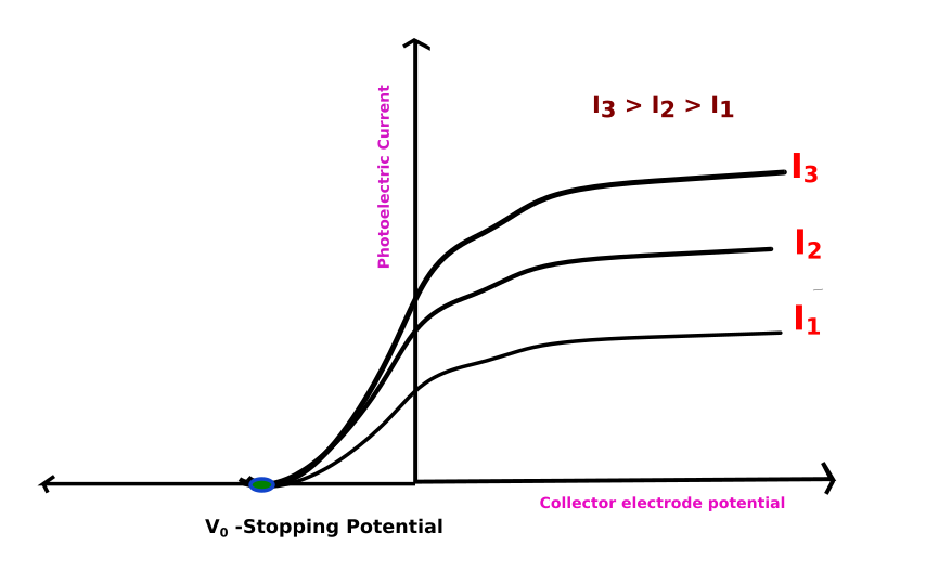 ഫോട്ടോ ഇലക്ട്രിക്ക് പ്രതിഭാസവുമായ് ബന്ധപ്പെട്ട ഗ്രാഫ്